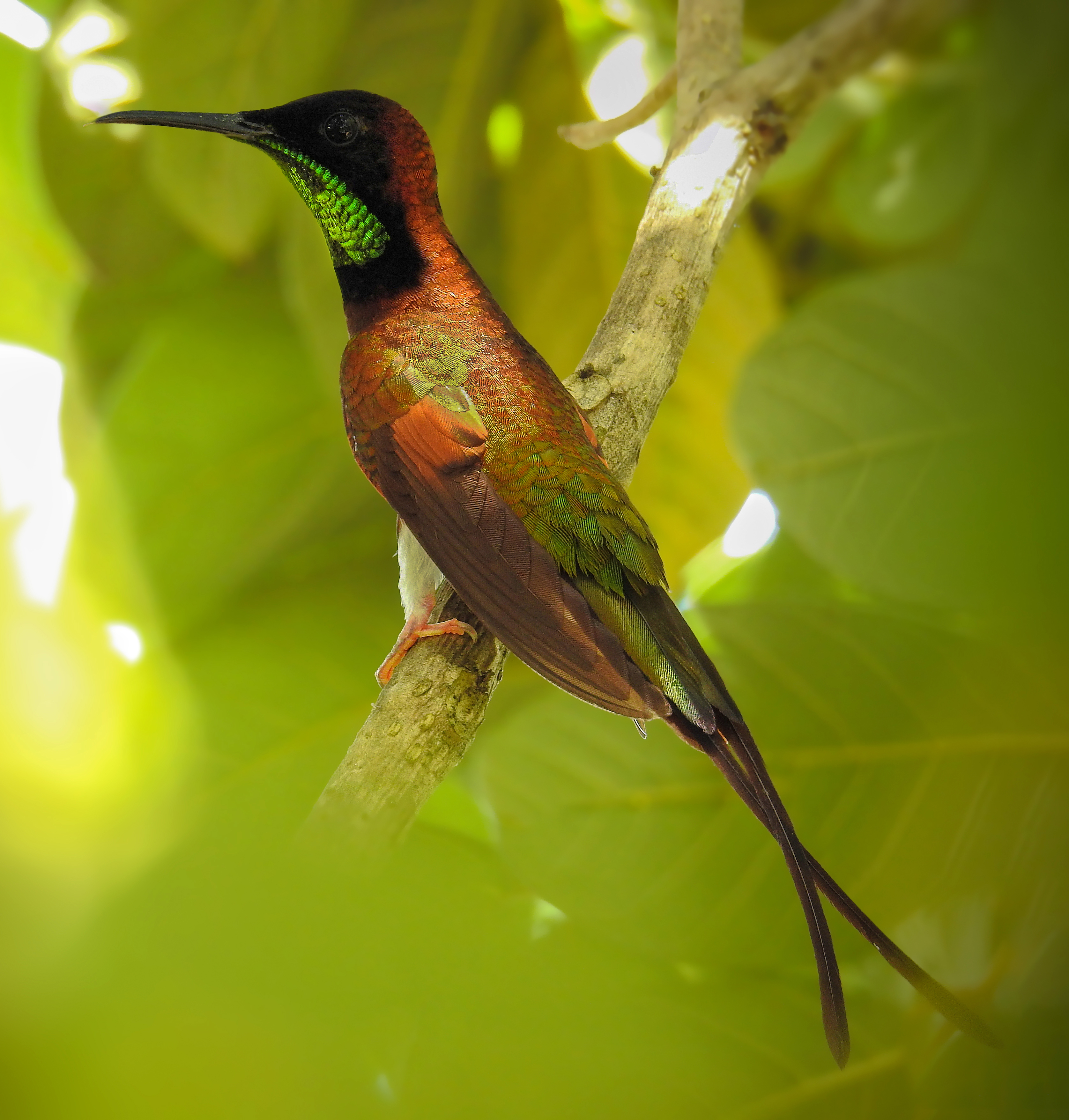 O beija-flor-brilho-de-fogo é uma ave da ordem dos Apodiformes, da família Trochilidae. O beija-flor-brilho-de-fogo é conhecido também como topázio-vermelho. É o maior e um dos mais bonitos beija-flores do Brasil.